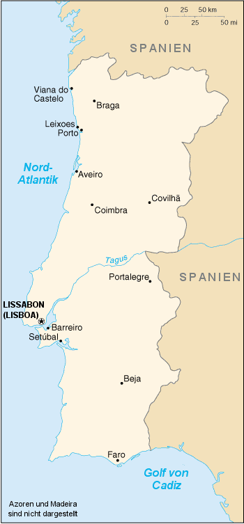 Karte von Portugal